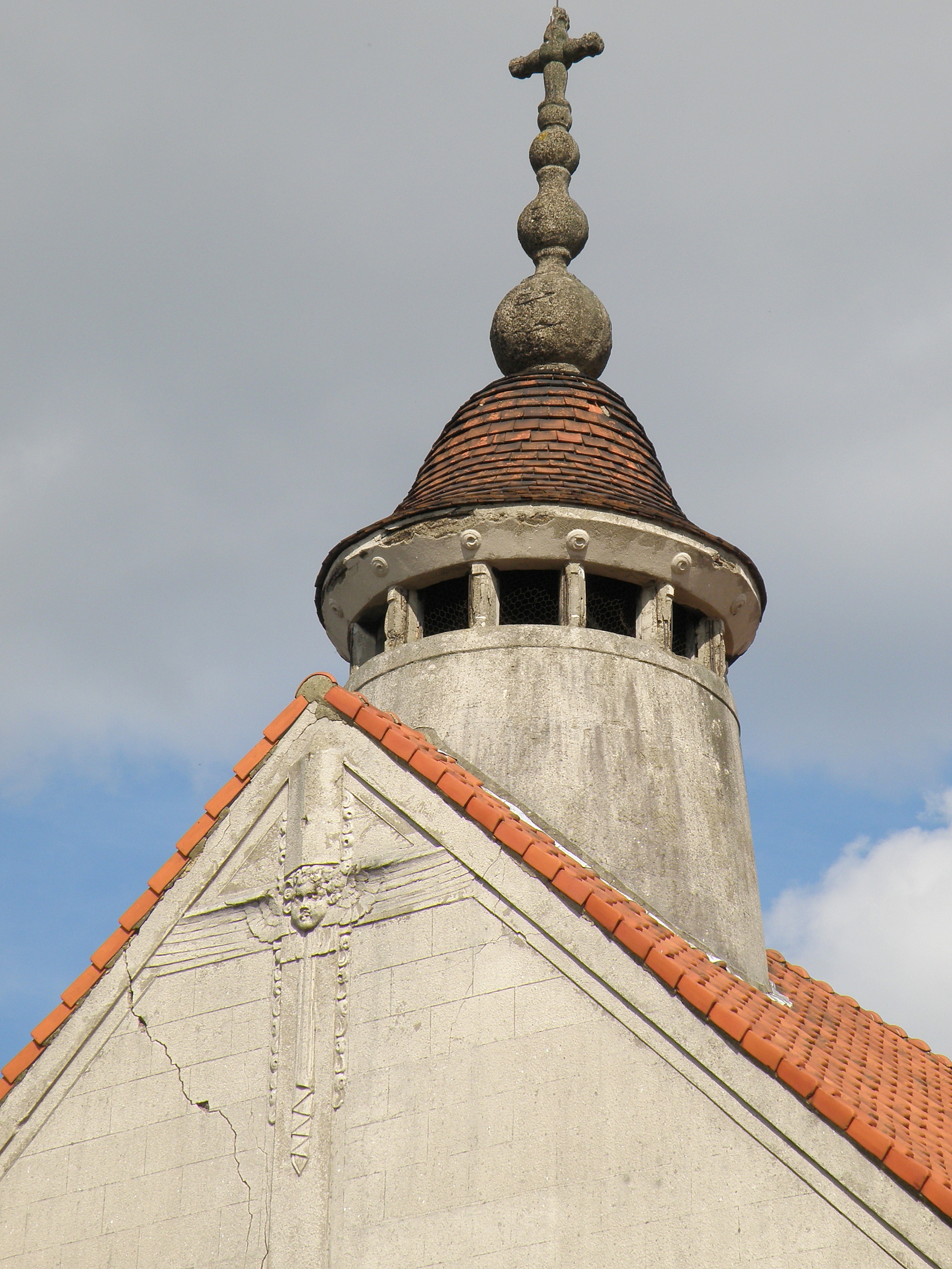 Anvers, Belgique. Église paroissiale Notre-Dame-du-Perpétuel-Secours (en néerl. O.-L.-V. Altijddurende Bijstand), de style Art déco, sise Merksemsesteenweg (chaussée de Merksem), à Deurne-Nord, dans la proche banlieue nord-est d’Anvers. Plans de l’arch. Jef Huygh, 1924-1925. Gros plan sur le clocheton.